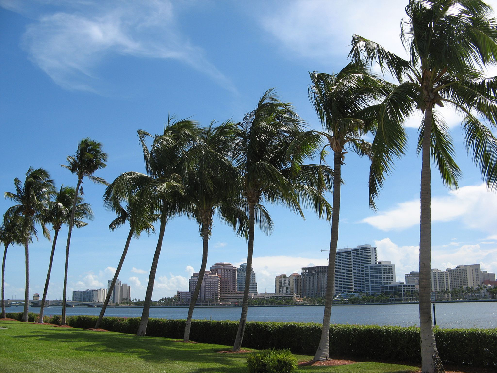 West Palm Beach, Floride. Cocotiers en Floride.